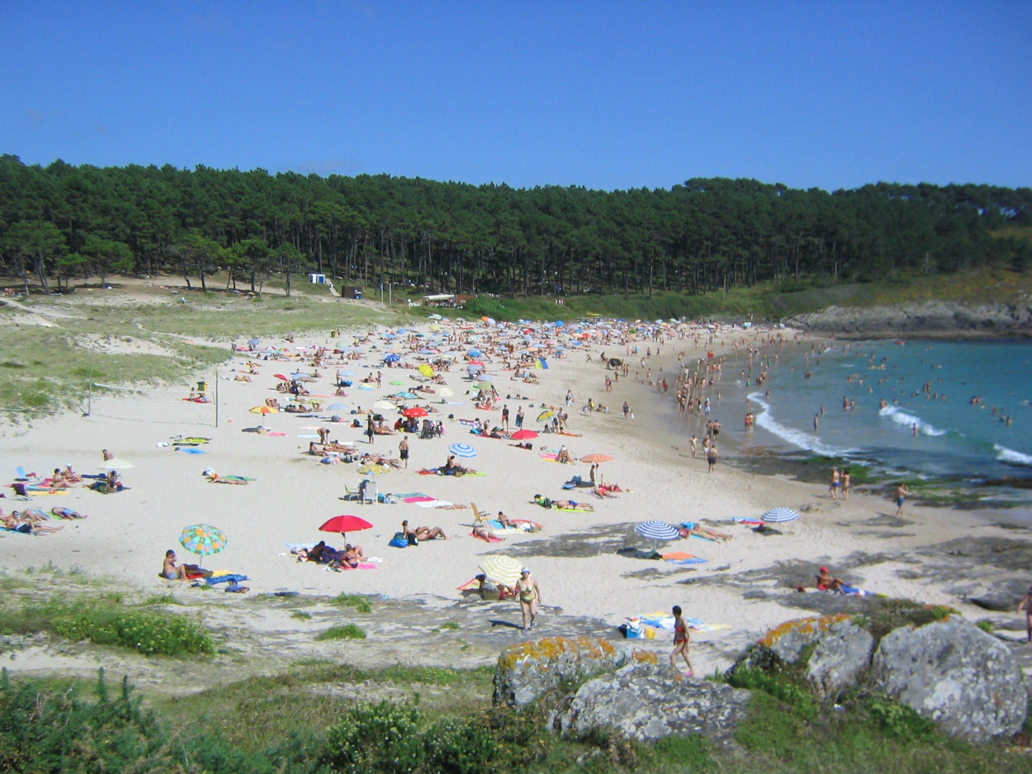 Cangas do Morrazo, playa de Melide. Pontevedra Galicia España.